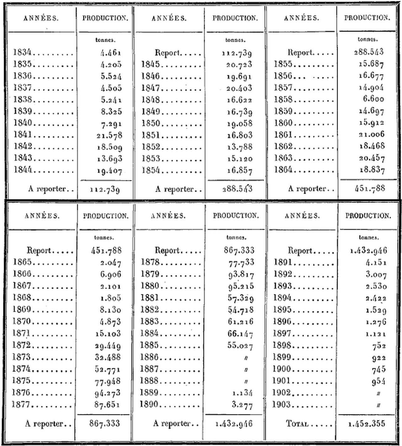 Production cumulée des Mines du Boulonnais. Document extrait de Étude des Gîtes Minéraux de la France. Topographie Souterraine du Bassin Houiller du Boulonnais ou Bassin d'Hardinghen, par A. Olry, ingénieur en chef des Mines.